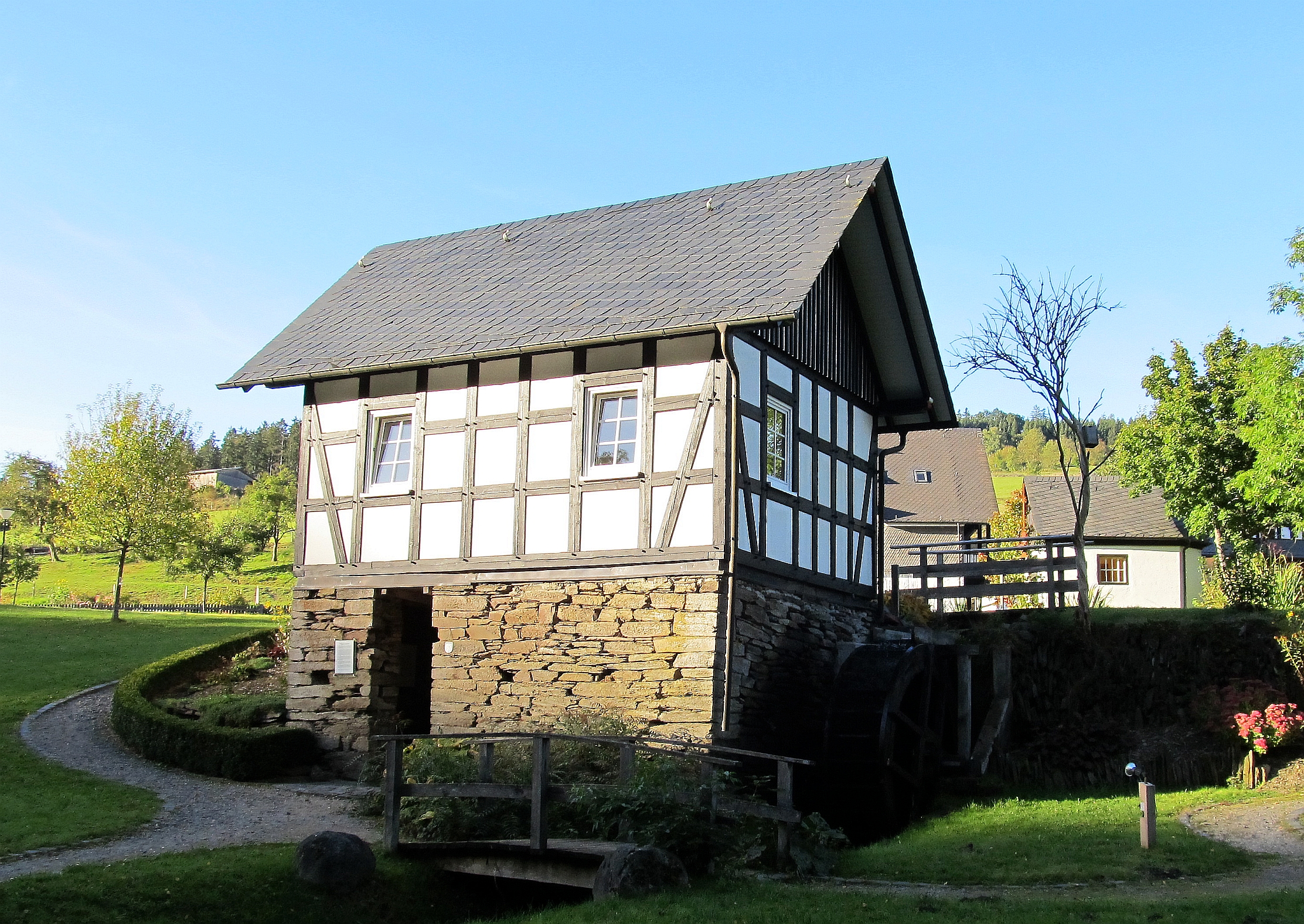 This is a photograph of an architectural monument., no. 204 Ehemalige Mühle Halberstadt in Schmallenberg-Latrop; das Gebäude wurde im Jahr 1739 als Eisenhammer vom Kloster Grafschaft errichtet; seit 2003 befindet sich ein Waldarbeitermuseum in dem Gebäude